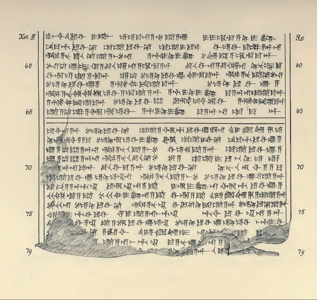 List Tuszratty do Amenhotepa III w języku huryckim – autografia.